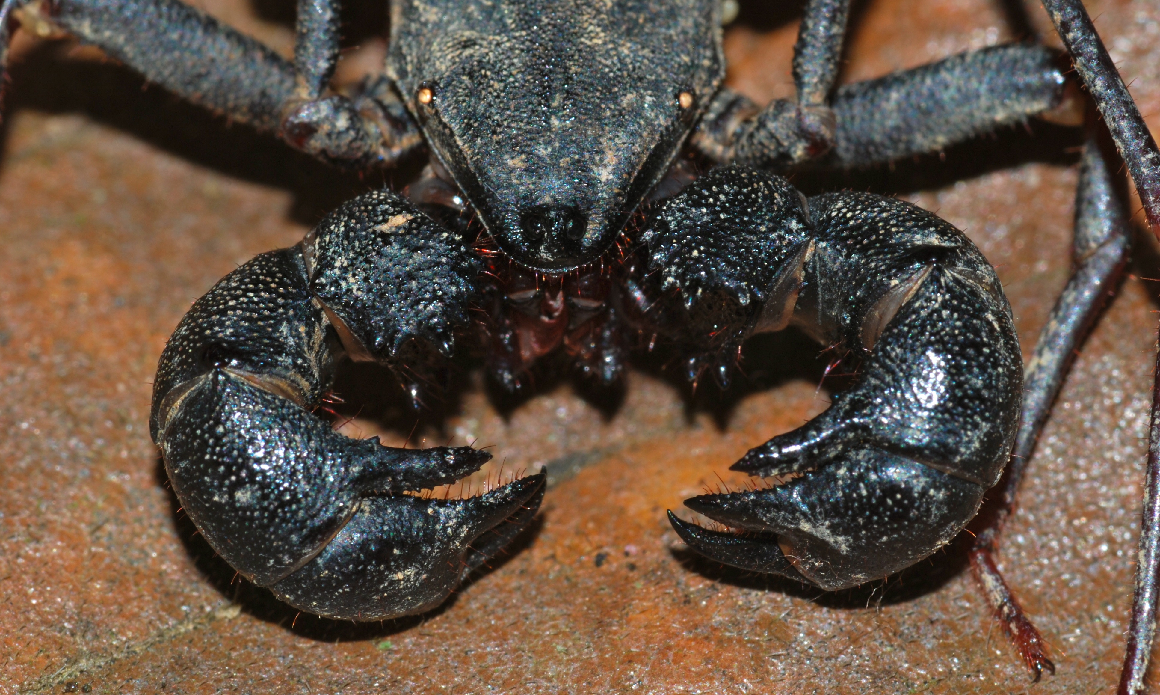 Taman Negara NP, Pahang, MALAYSIA